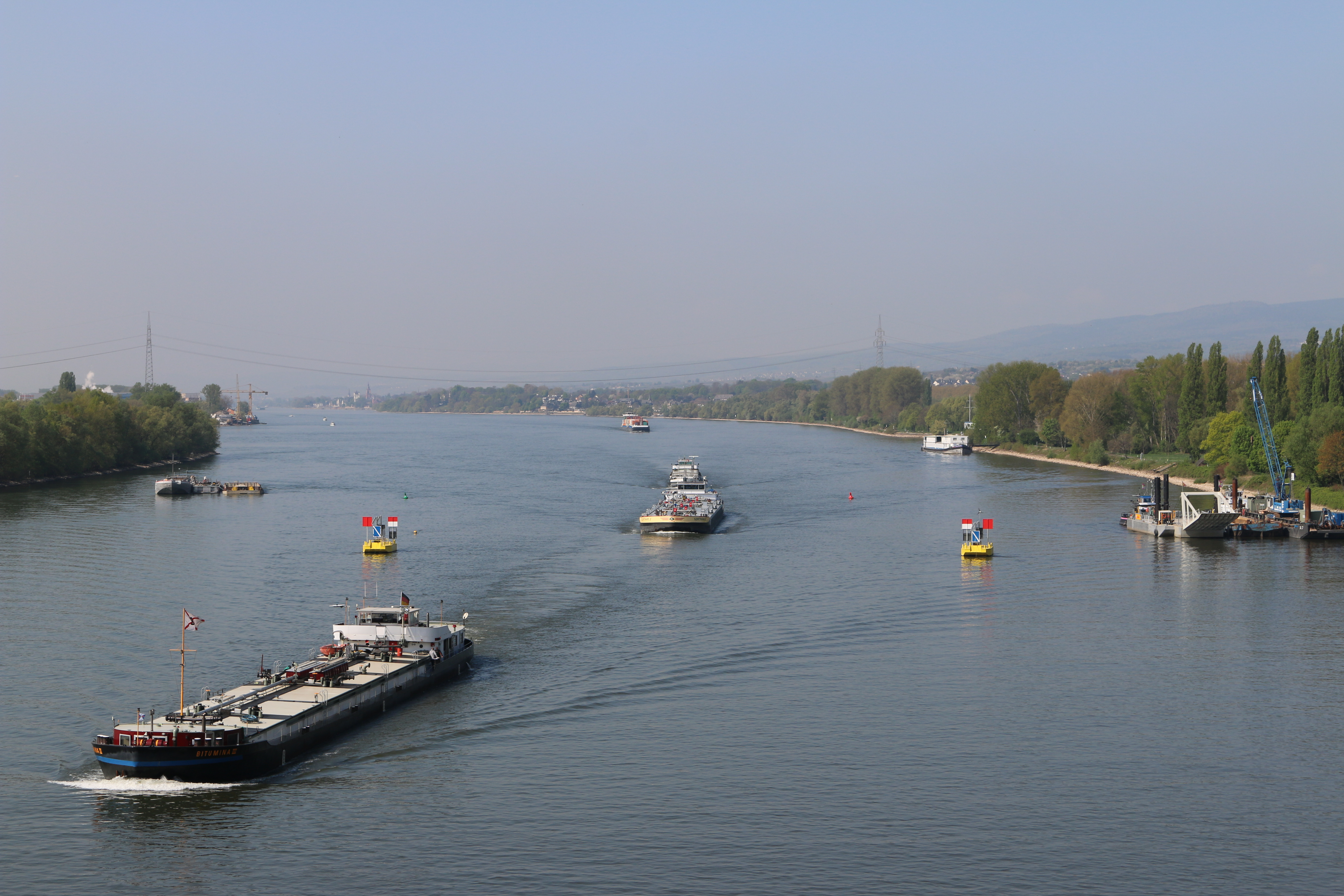 Neubau der Schiersteiner Brücke: Rheinschiffe passieren die Baustelle